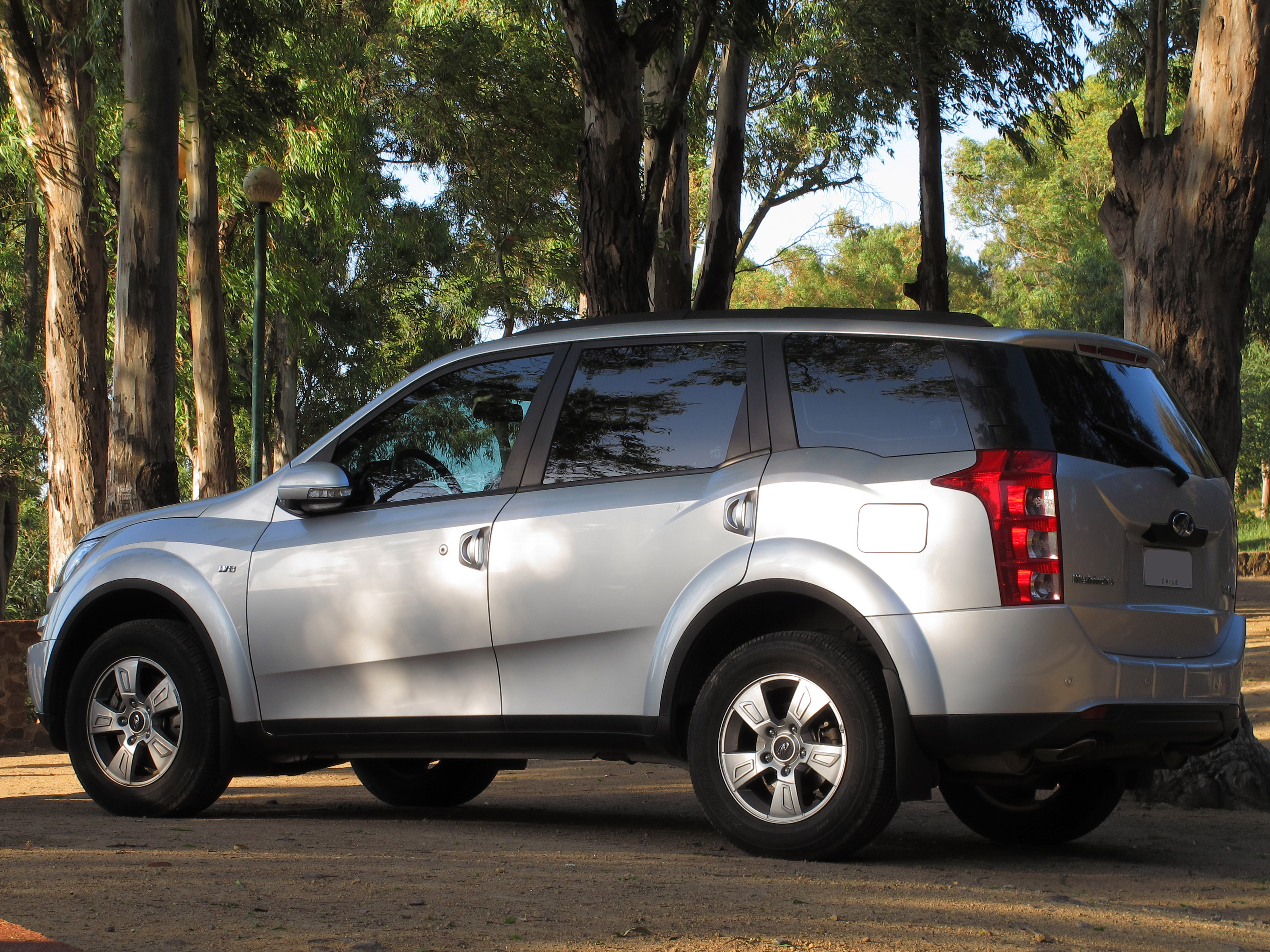 Mahindra XUV 500 W8 2014